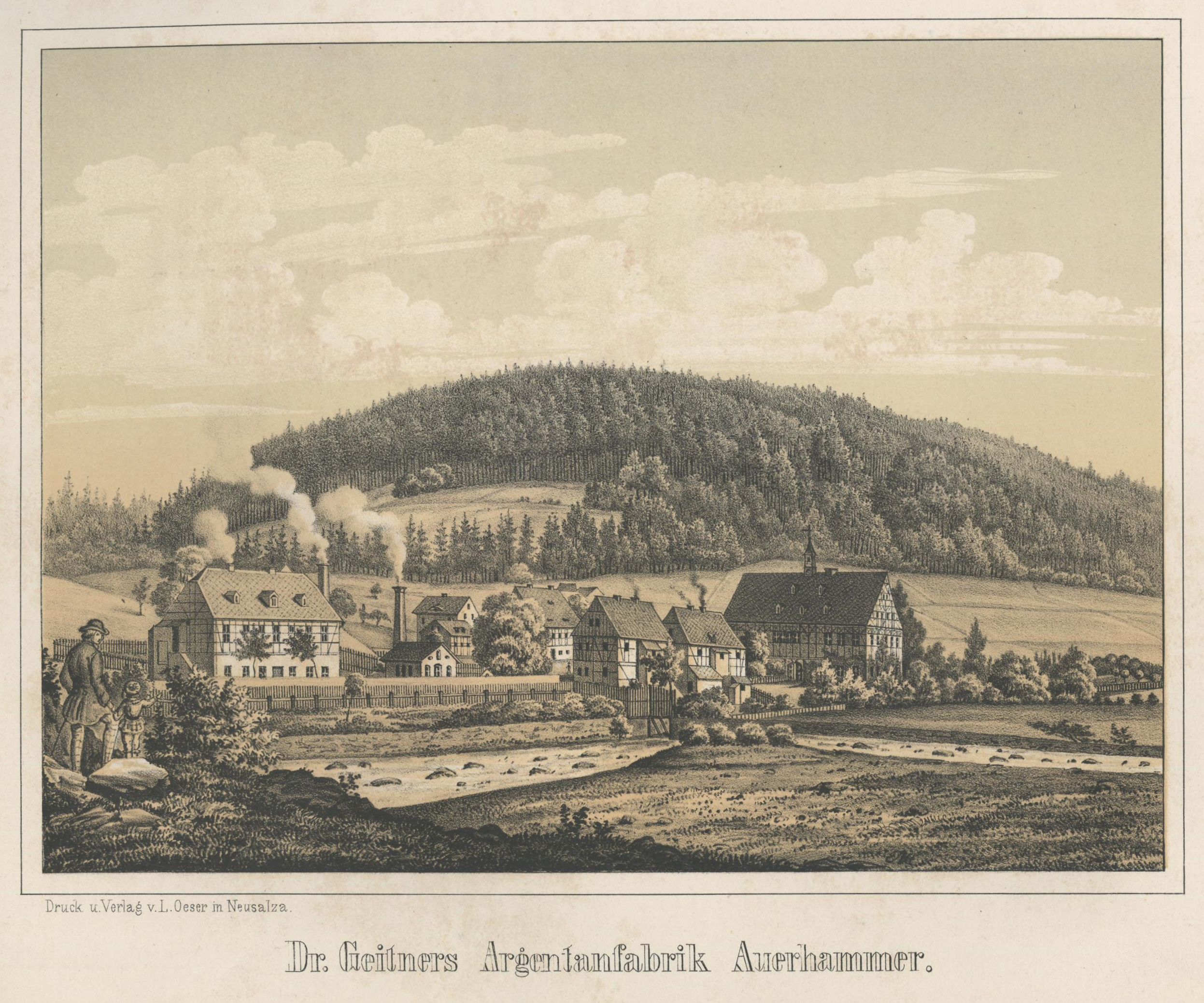 Dr. Geitners Argentanfabrik Auerhammer aus: Album der Sächsischen Industrie Erster Band